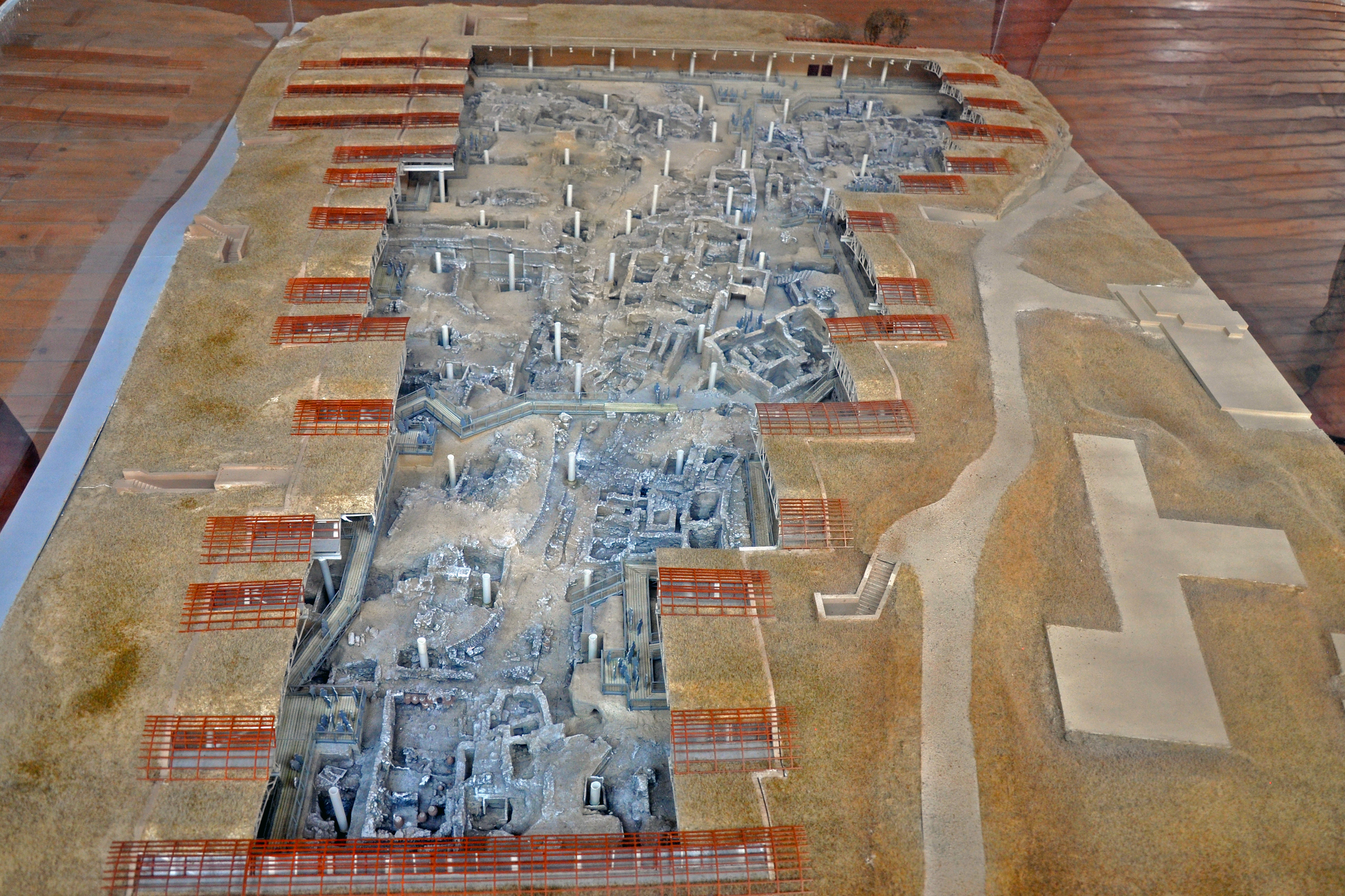 Plastico degli scavi di Akrotiri, Santorini, Grecia.